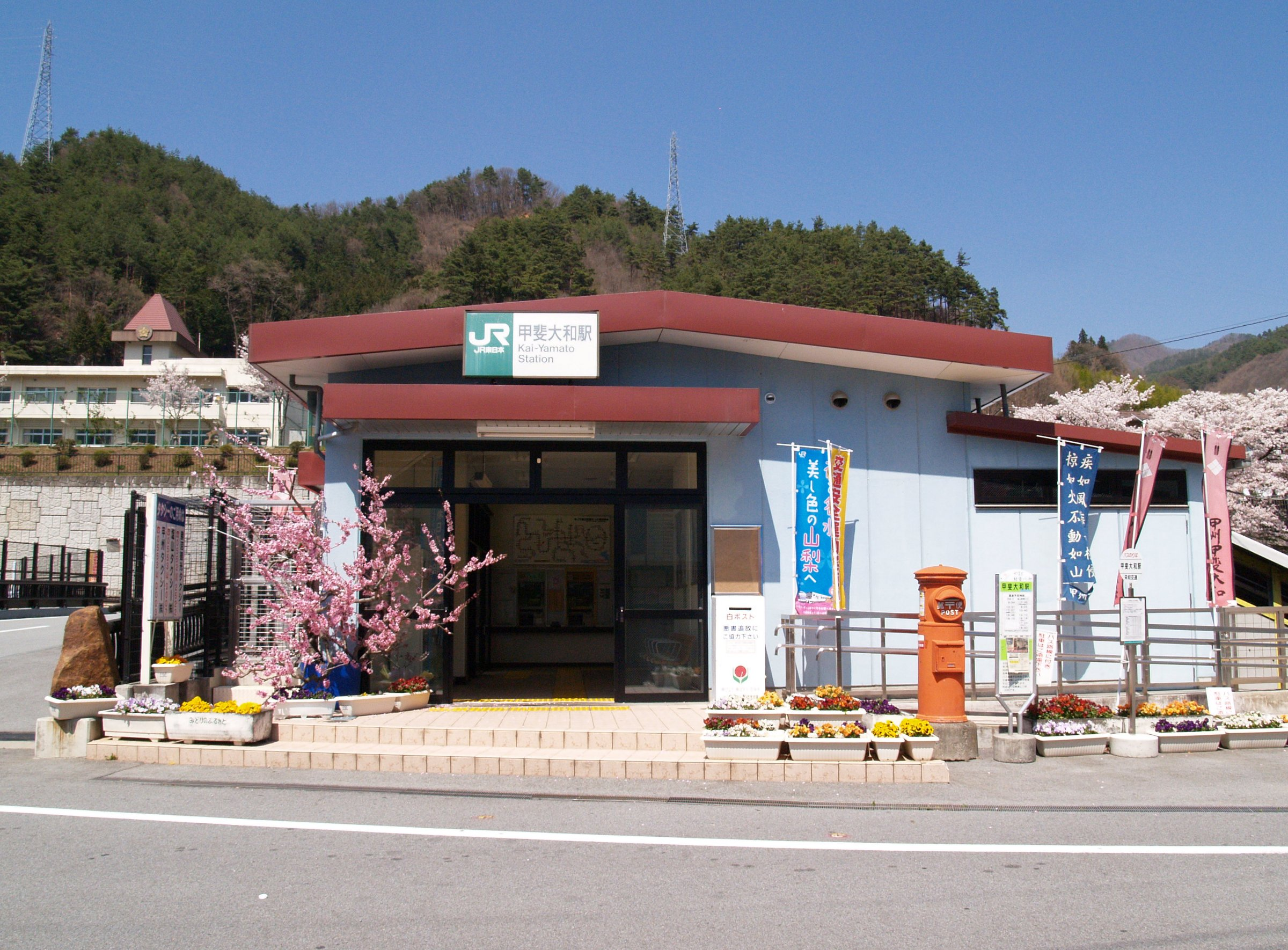 甲斐大和駅